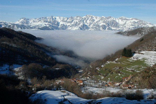 Los Picos de Europa desde Lamedo Picos de Europa desde Lamedo, Cabezón de Liébana (Cantabria, España) jlgomezlinares